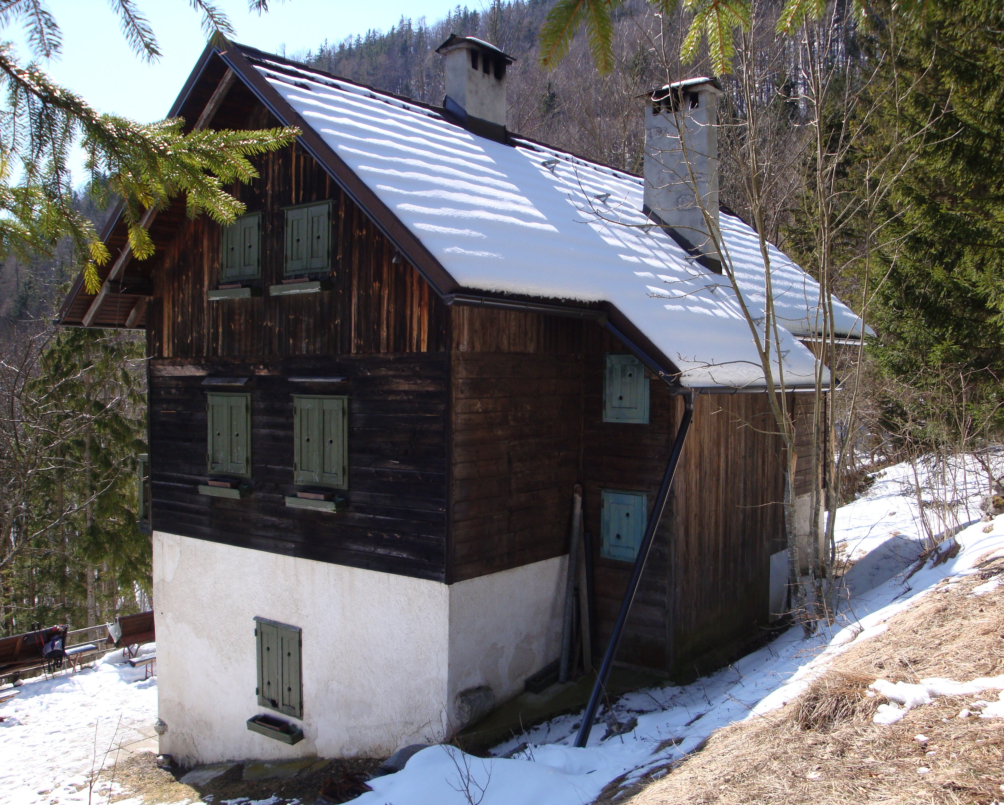 Dom na Čemšeniku.